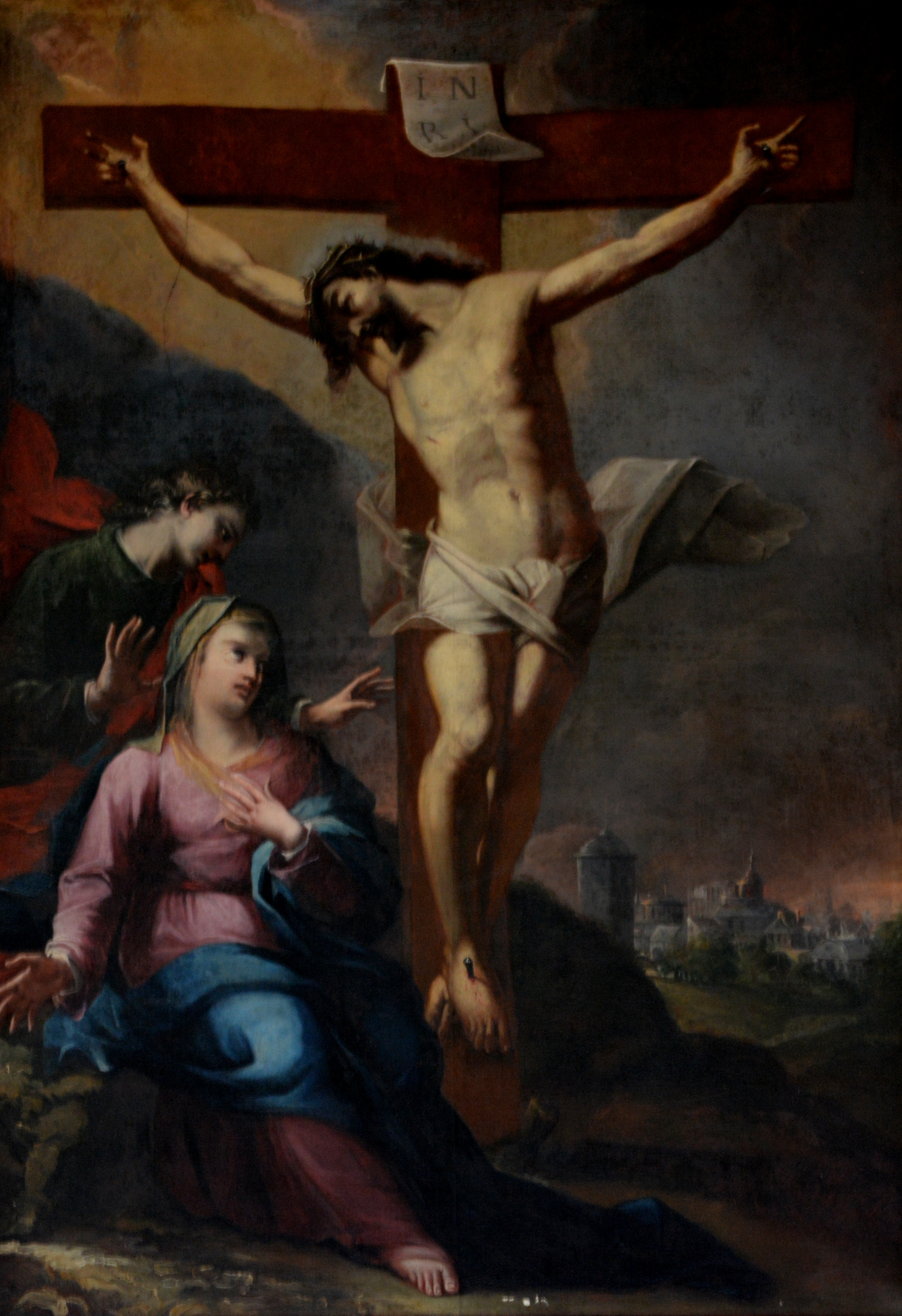 Bornich, protestantske tsjerke, oaljefarve-skilderij, krusiging mei Marije en Jehannes